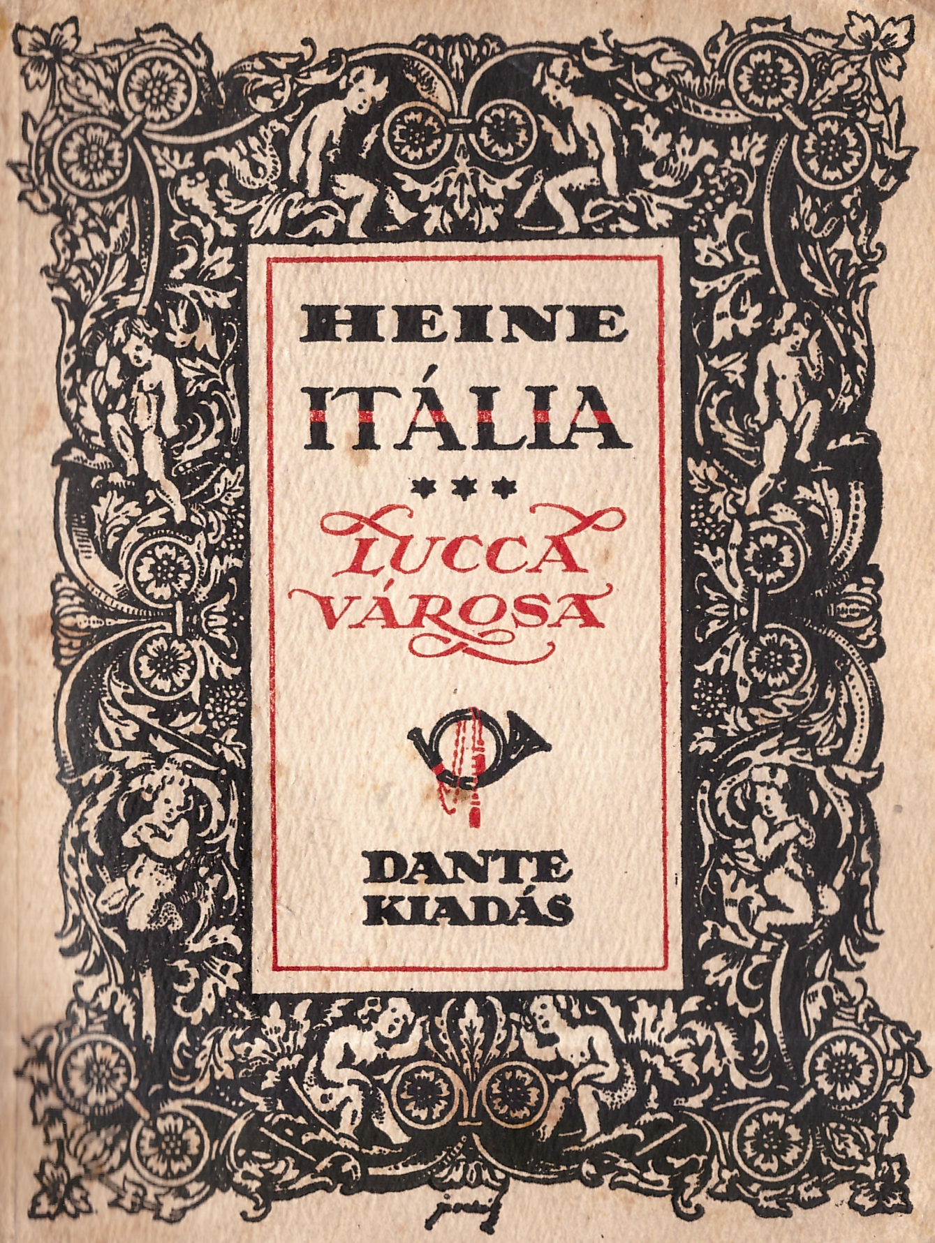 Heirich Heine (1797-1856): Itália - Lucca városa (Dante Kiadó, Budapest, 1920)